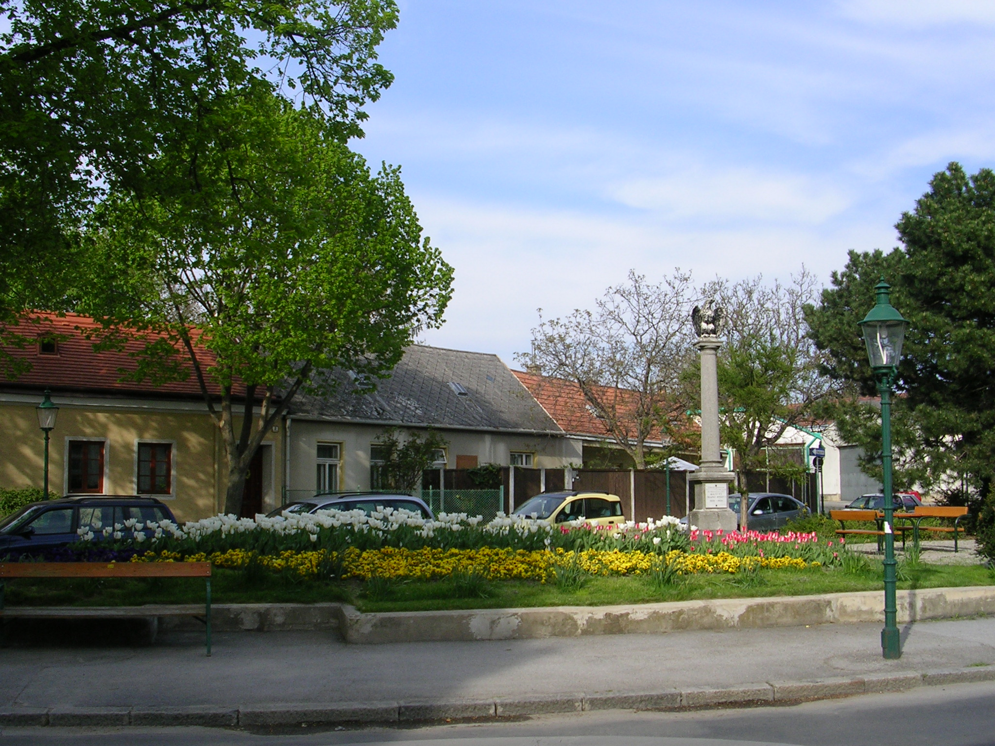 Freiheitsplatz (Freedom place) in Stammersdorf (Wien)